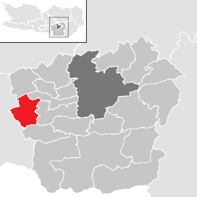 Bezirk Klagenfurt-Land